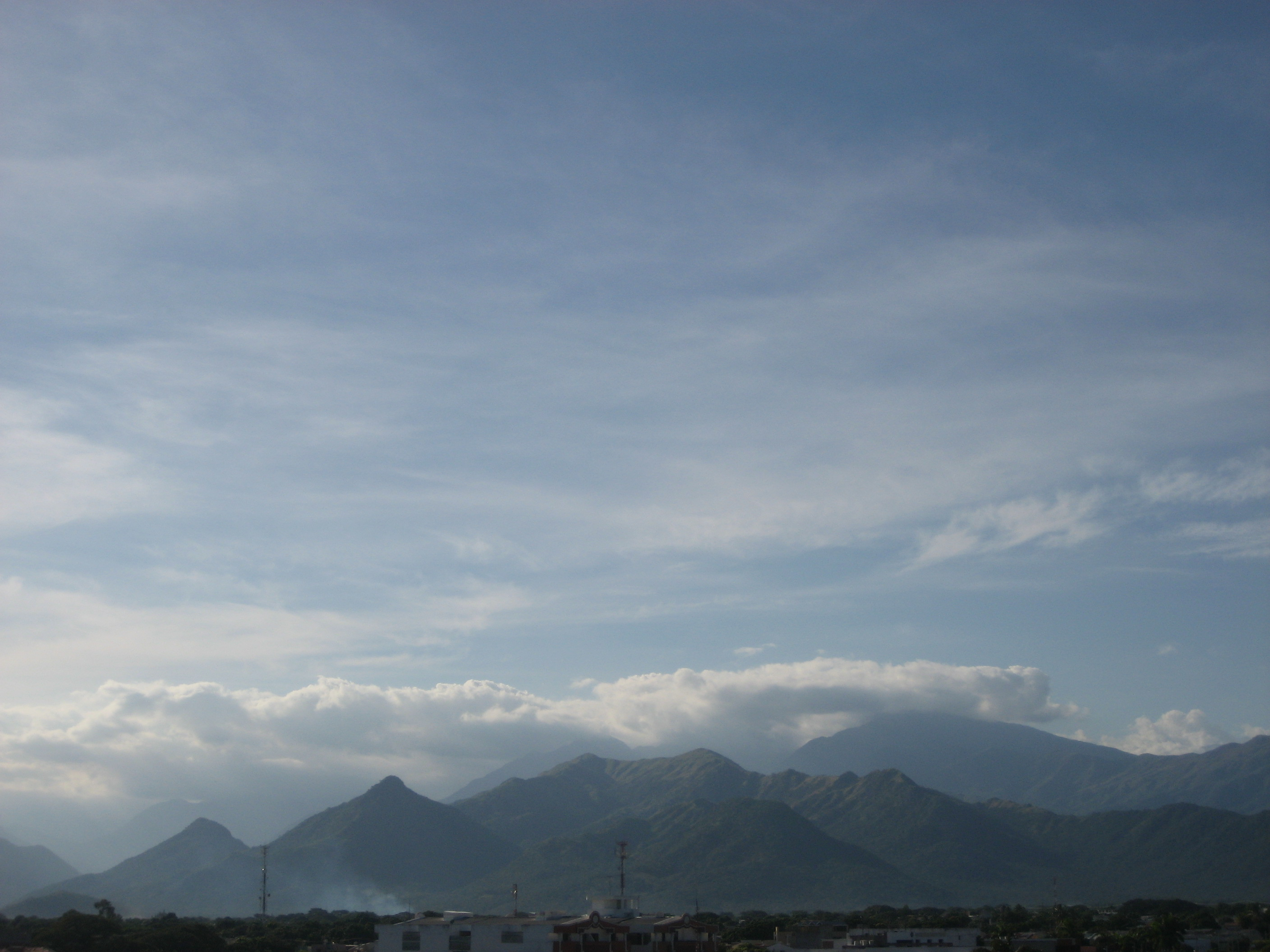 Cerro del Alguacil, Sierra Nevada de Santa Marta. Valledupar, Colombia.